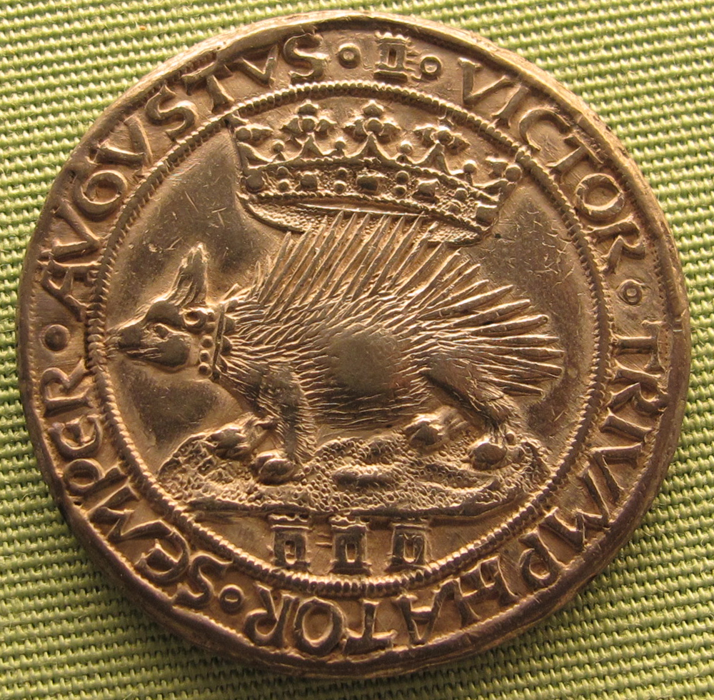 Michel colombe (dis) e jean chapillon, luigi XII conquista milano, verso con porcospino, 1499